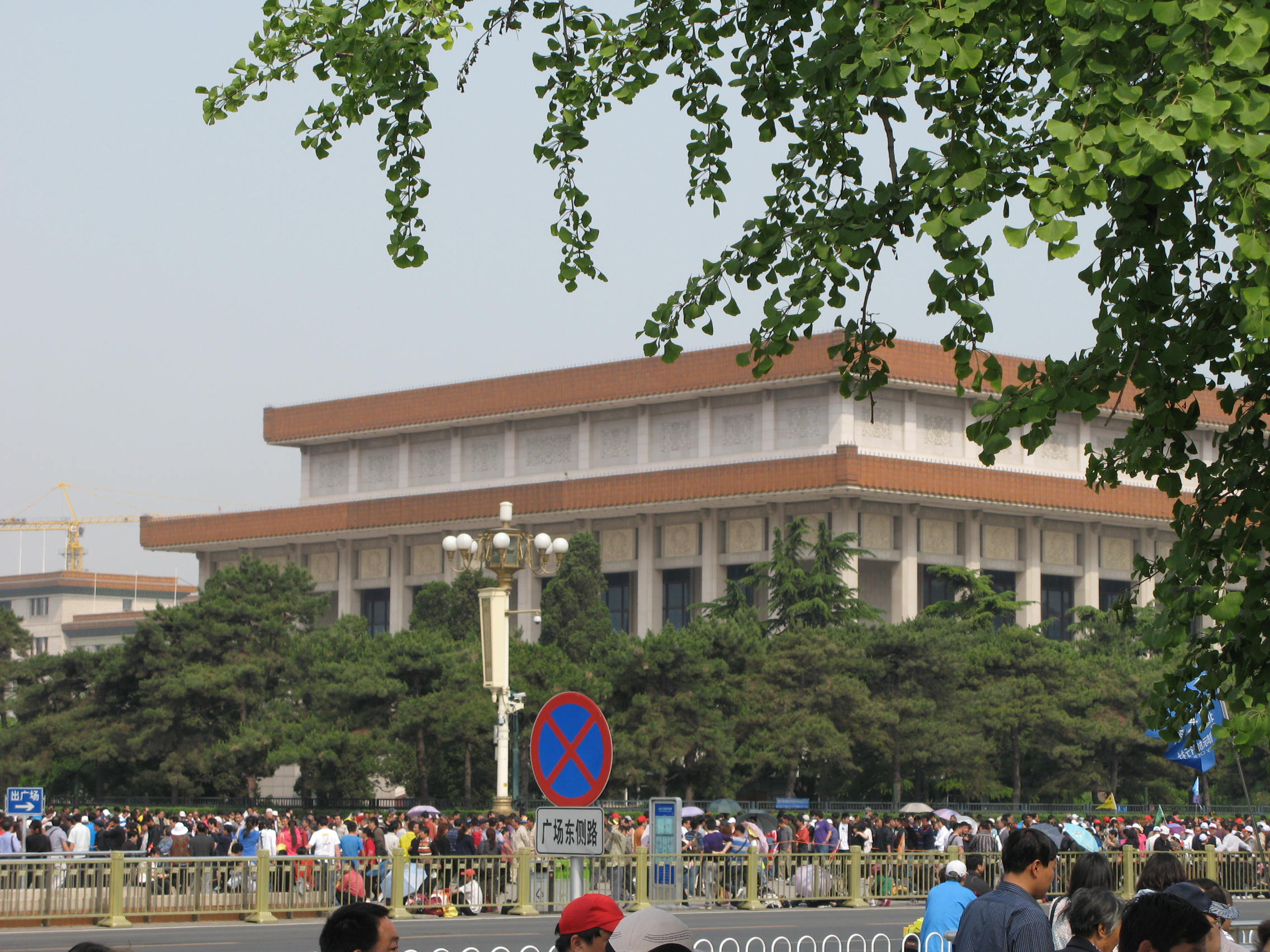 Mao Cetungov mavzolej v Pekingu.